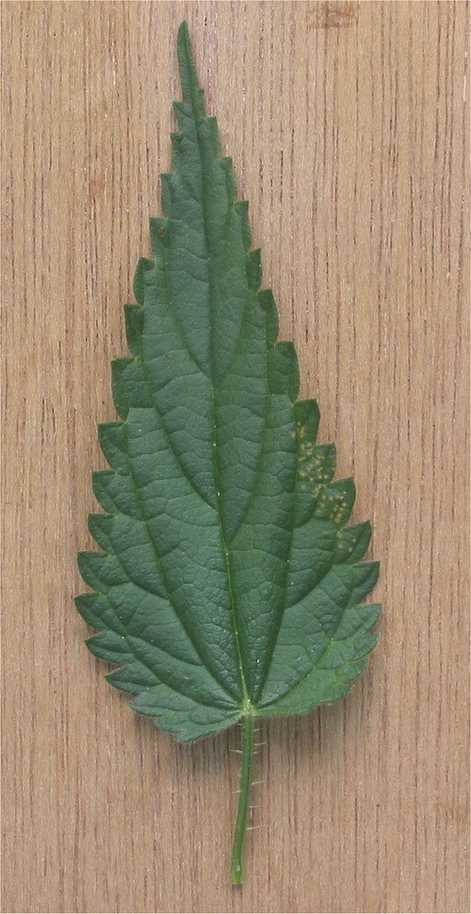 (nl: Grote brandnetel blad met gezaagde rand) Urtica dioica leave